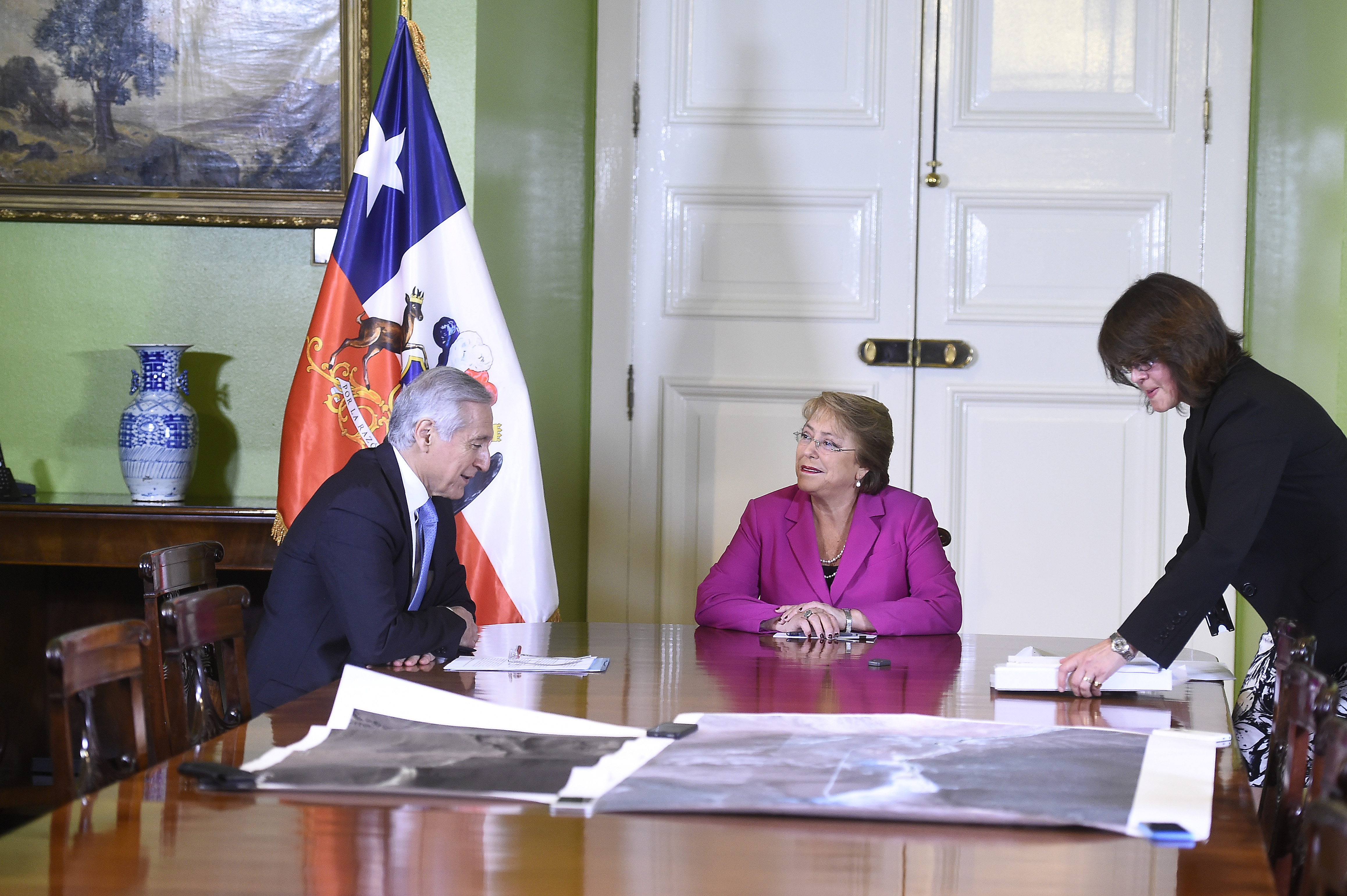 Bachelet recibe al ministro de Relaciones Exteriores por anunciada demanda de Bolivia sobre las aguas del río Silala